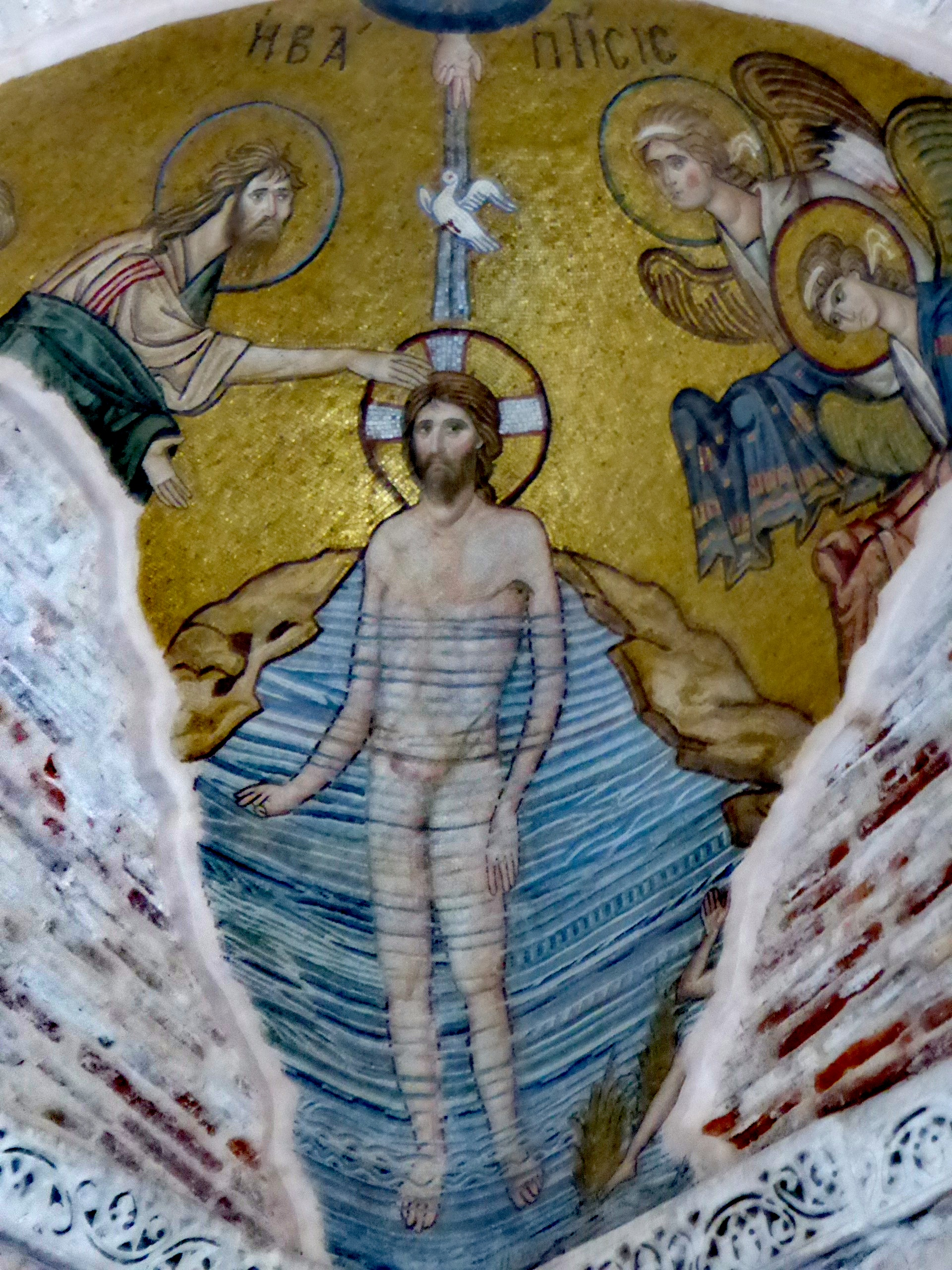 Kloster Dafni (bei Athen): Taufe Christi